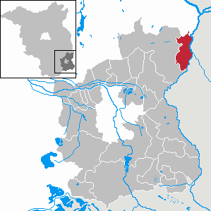 Guben in Brandenburg (Country) - District Spree-Neiße